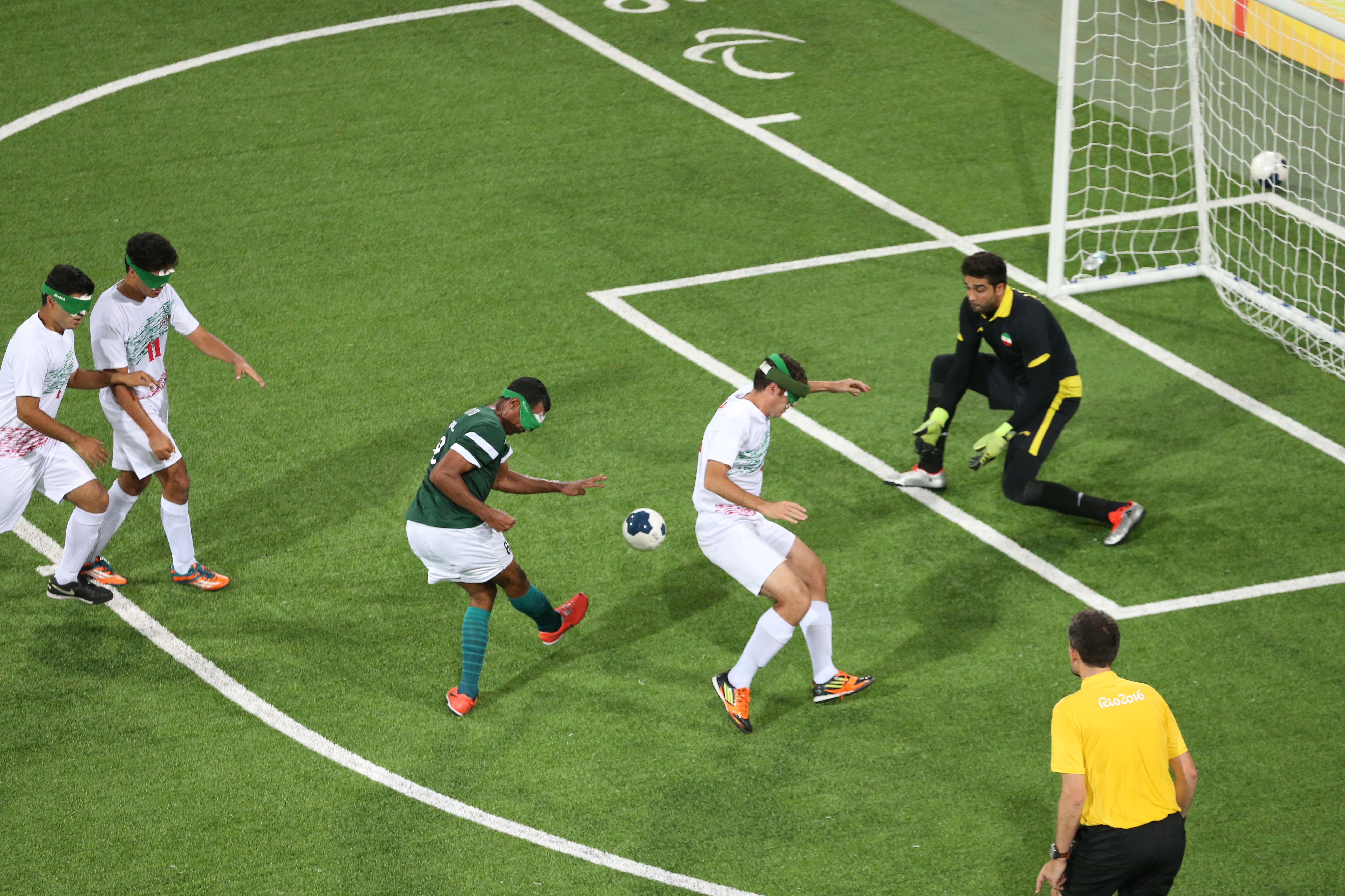 Rio de Janeiro - Brasil vence Irã por um a zero no futebol de cinco e ganha medalha ouro na Paralimpíada Rio 2016 (Tomaz Silva/Agência Brasil)